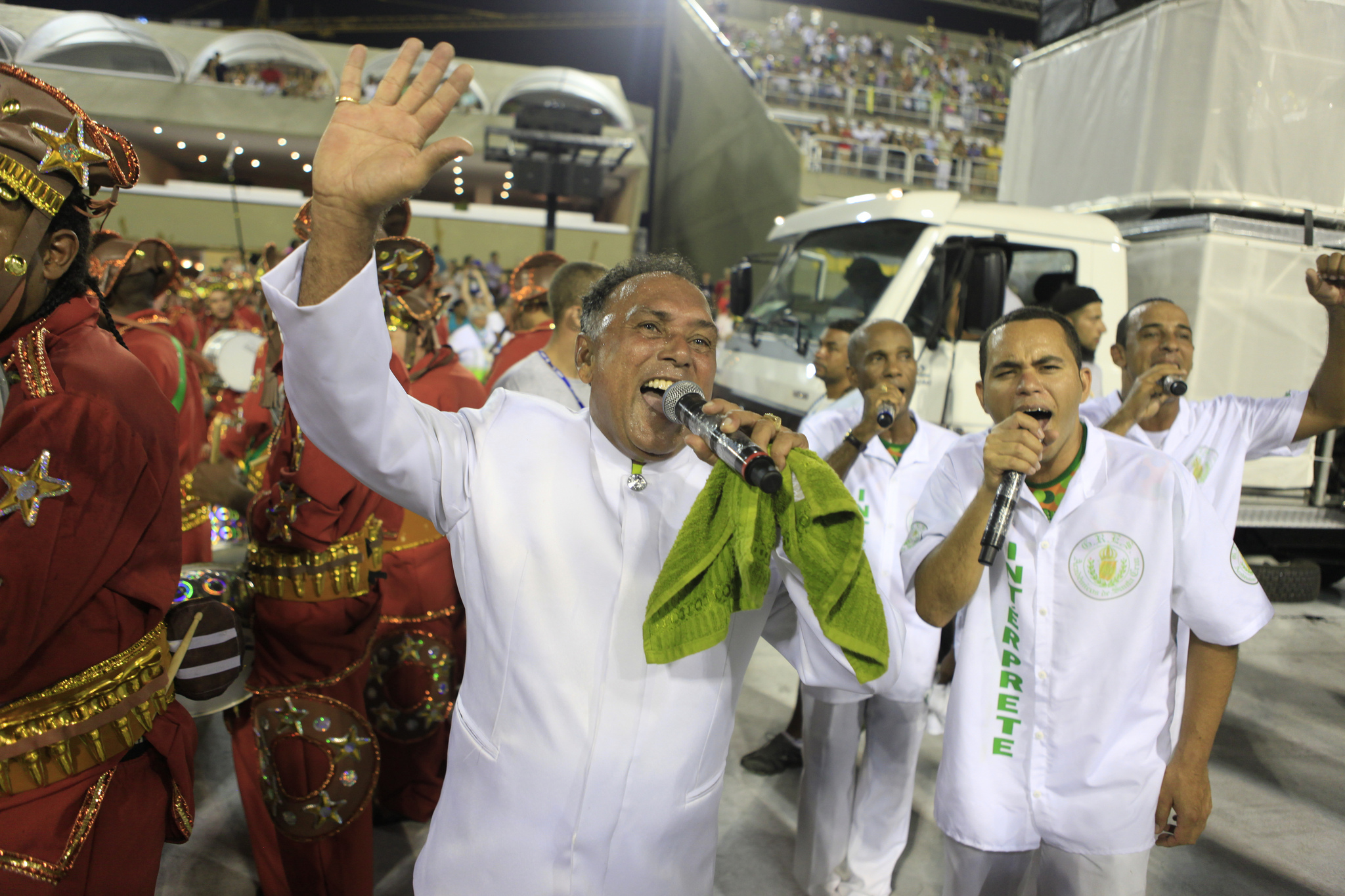 Rio de Janeiro - Segundo dia dos desfiles das escolas de samba no Rio. (Raphael David/Agência Brasil)